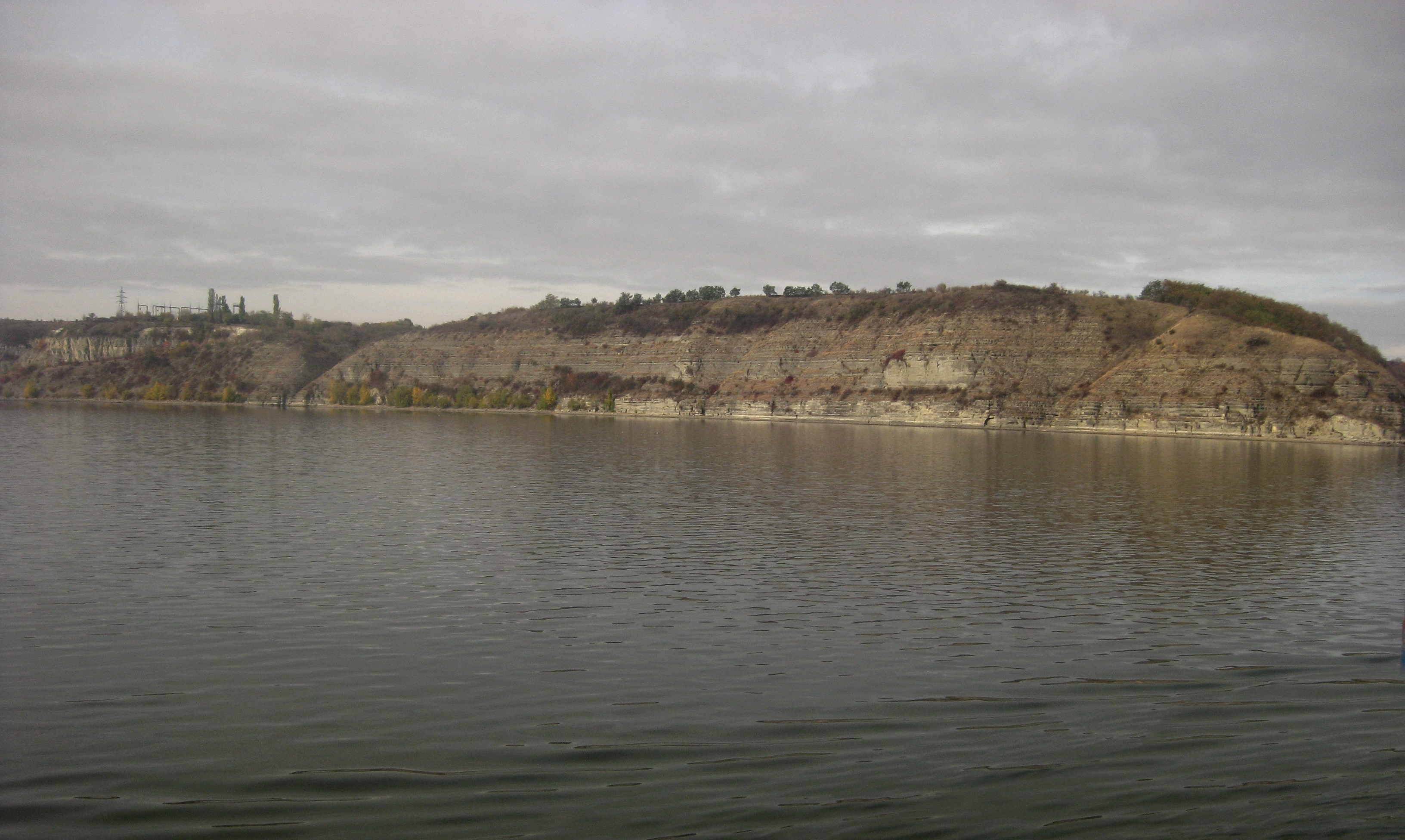 Розріз канилівської свити, Кам'янець-Подільський район, поблизу с. Устя